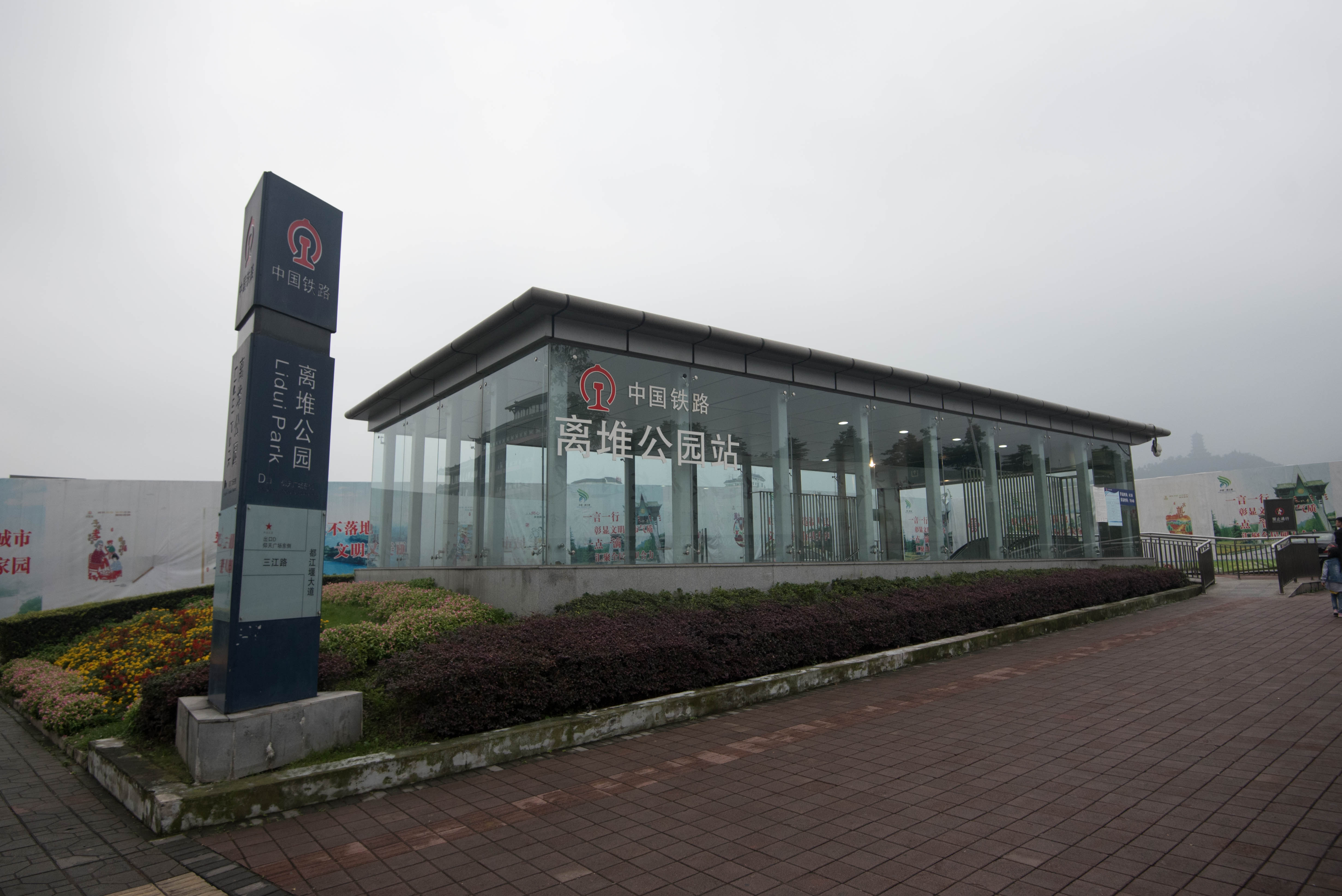 成灌铁路离堆公园站